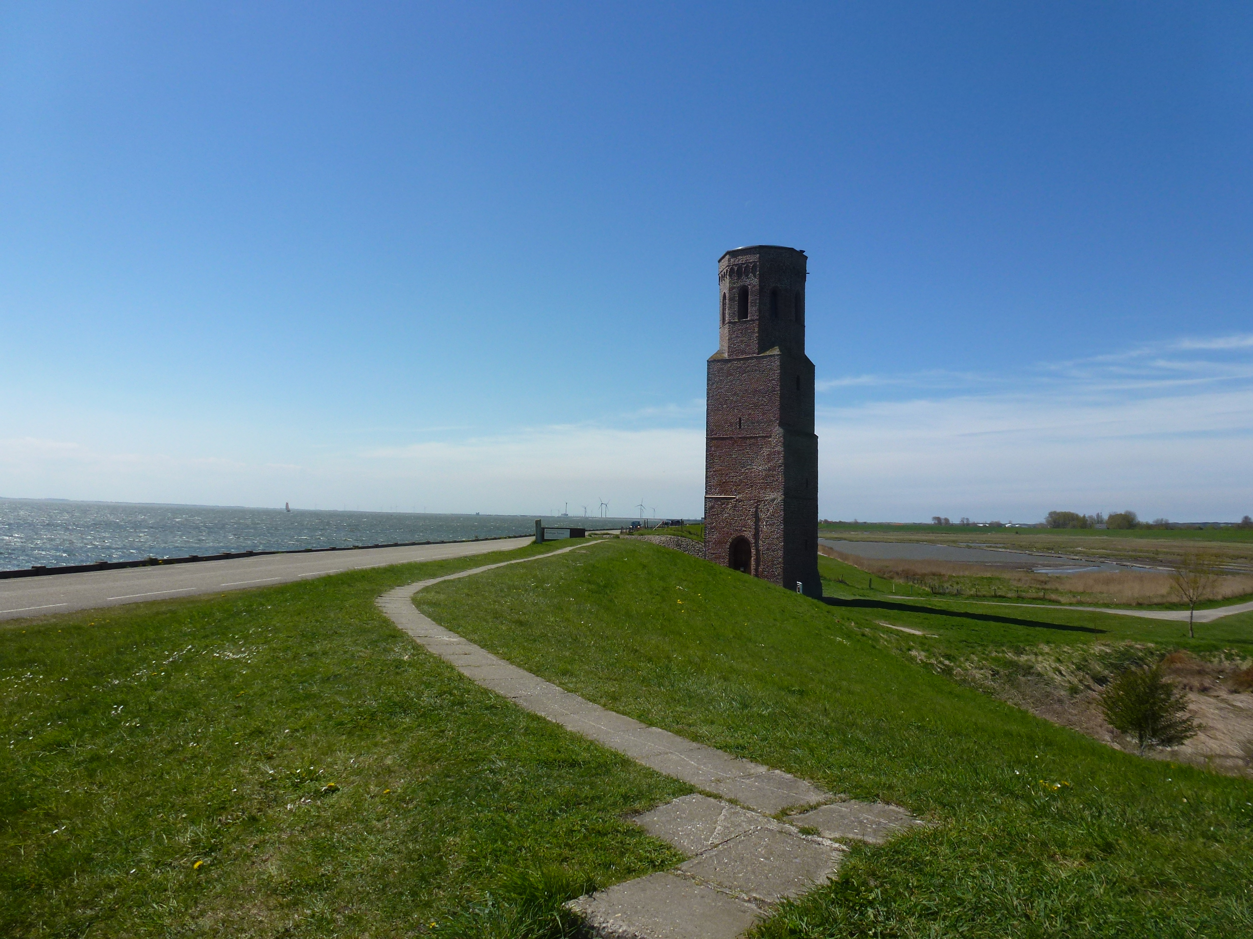 Plompetoren van Westerschouwen